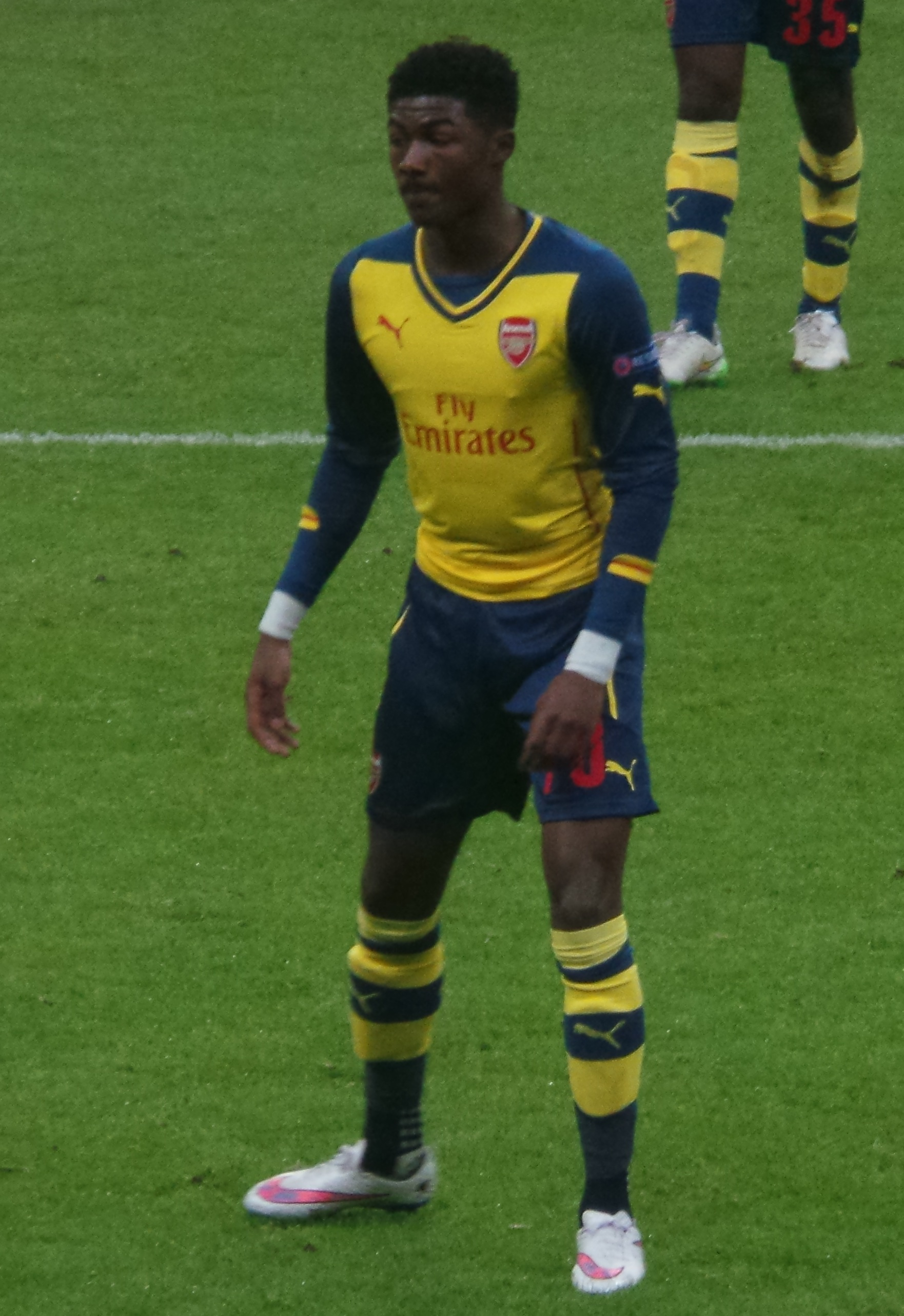 Ainsley Maitland-Niles